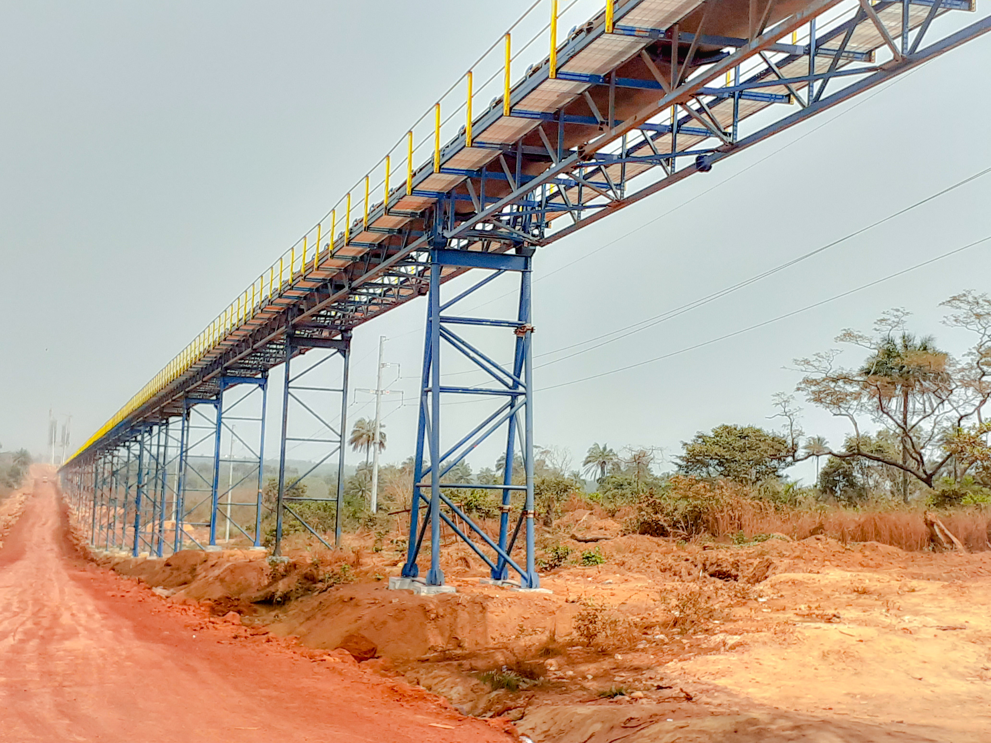 Transport de Bauxite a Boffa This is an image with the theme "Africa on the Move or Transport" from: Guinea